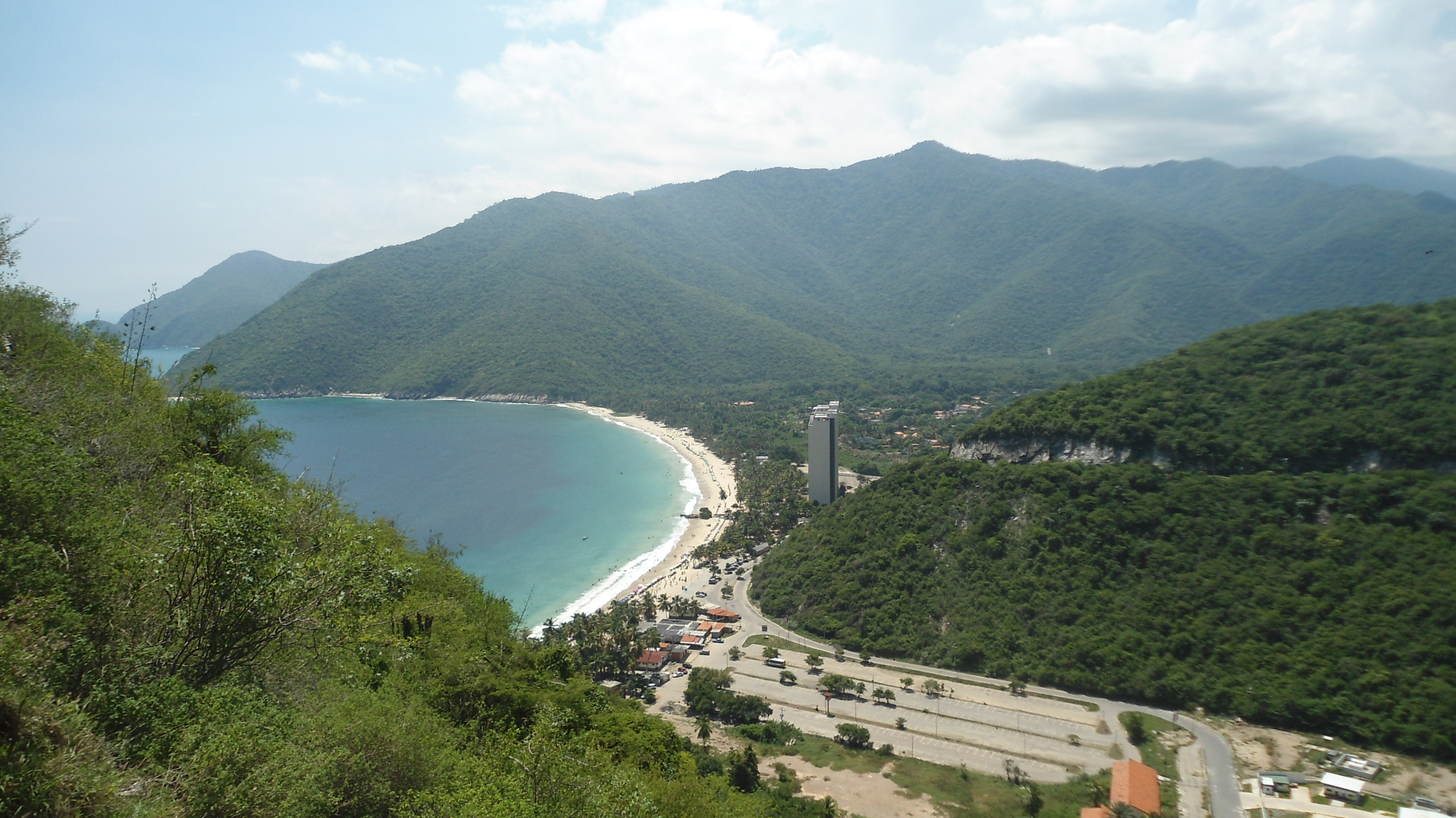 Uno de nuestros viajes en familia por las hermosisimas costas de nuestro país.